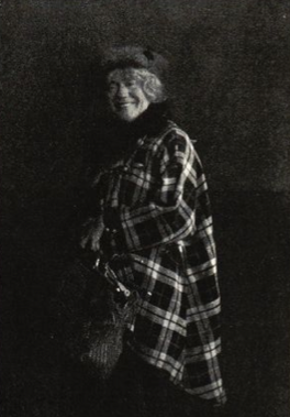 Tyra Dörum som fru Badger i Damen i skärt.